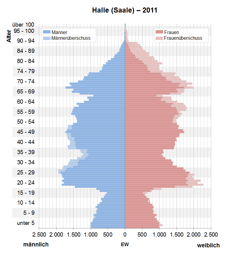 Bevölkerungspyramide der Stadt Halle (Saale) nach Zensus 2011.